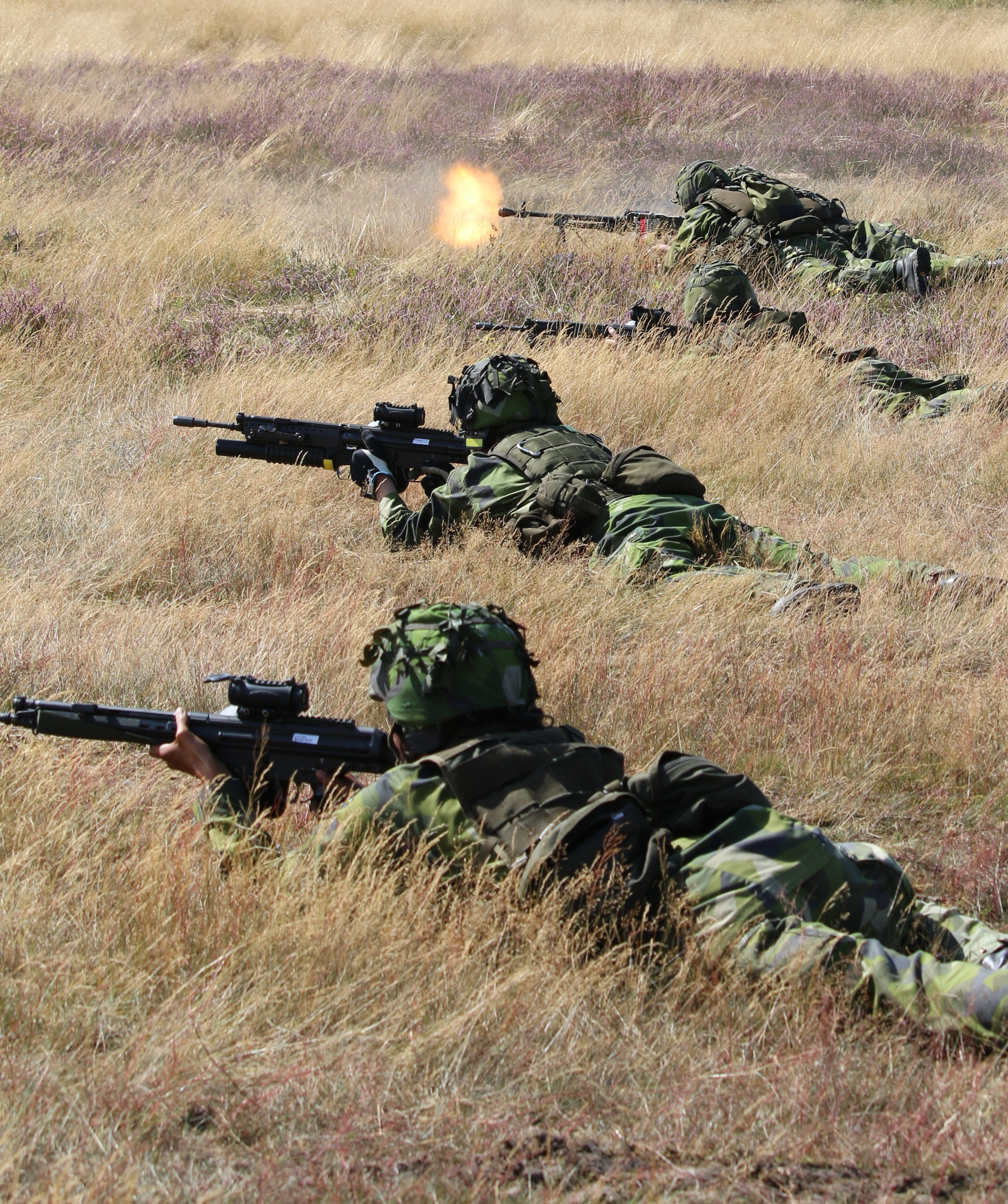 Skyttesoldater från Hemvärnet Revinge 2015